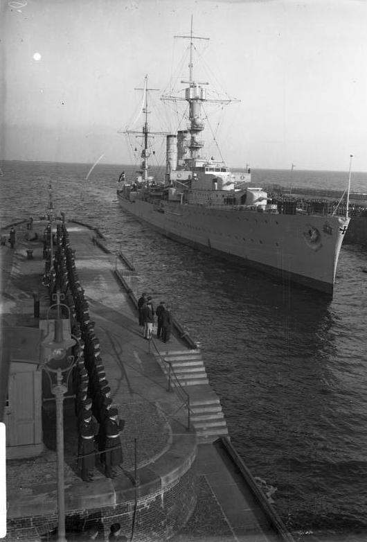 Der deutsche Kreuzer Emden nach einjähriger Weltfahrt in Wilhelmshaven zurückgekehrt ! Der deutsche Kreuzer "Emden" ist nach einjähriger Weltfahrt in Wilhelmshaven eingelaufen.